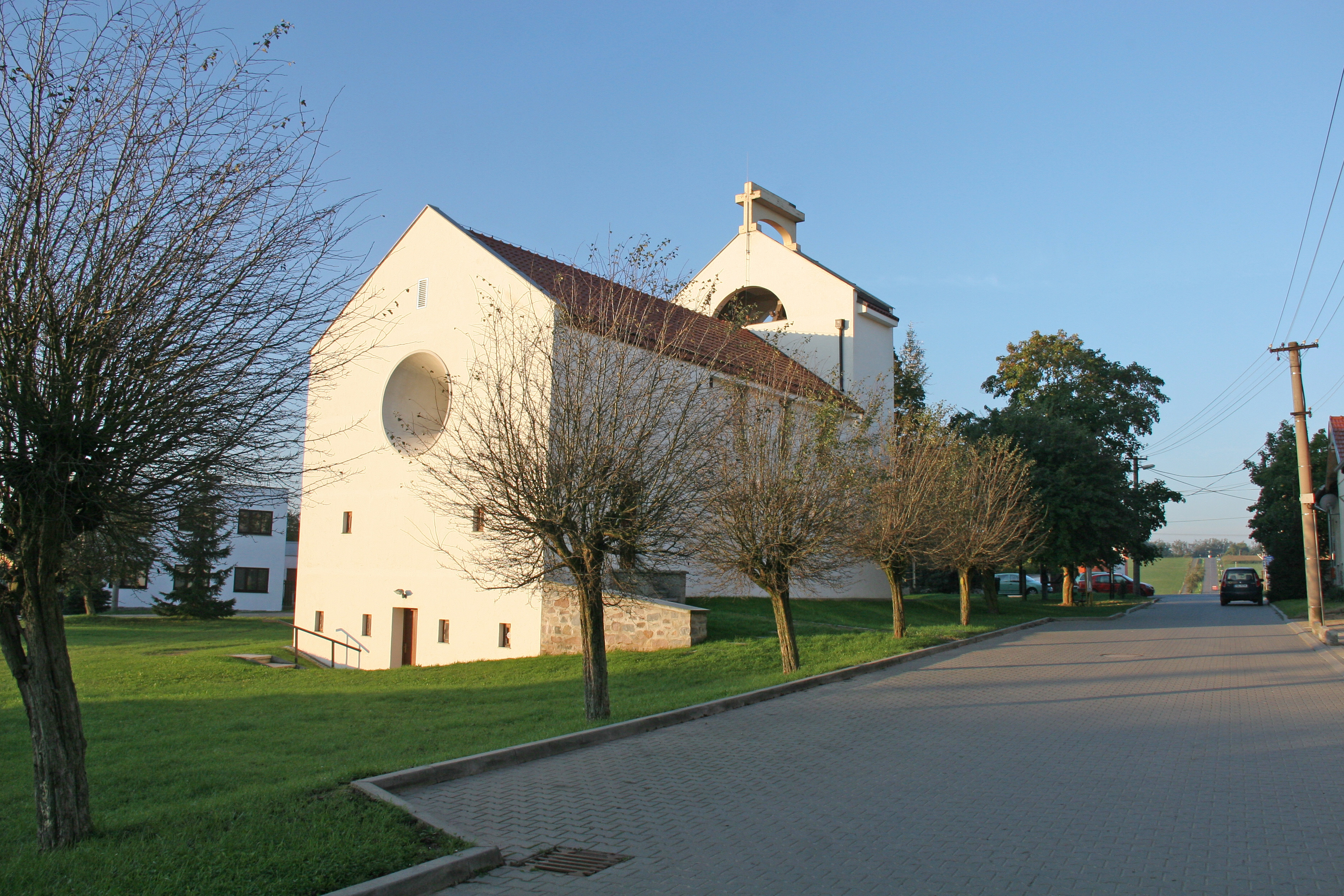 Šumná kaple